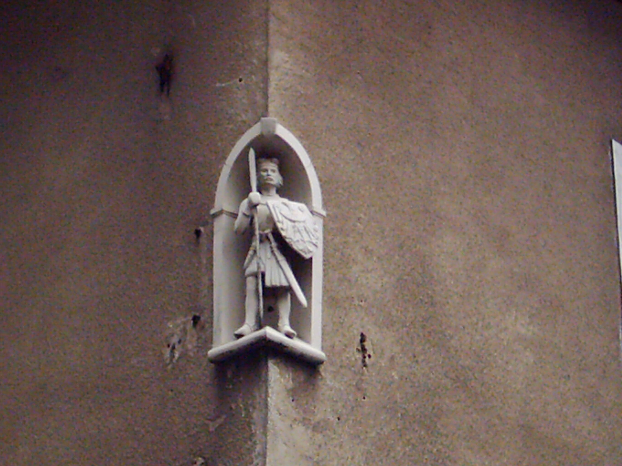 Wodzisław Śląski - Figura Władysława Opolskiego w niszy kamienicy.